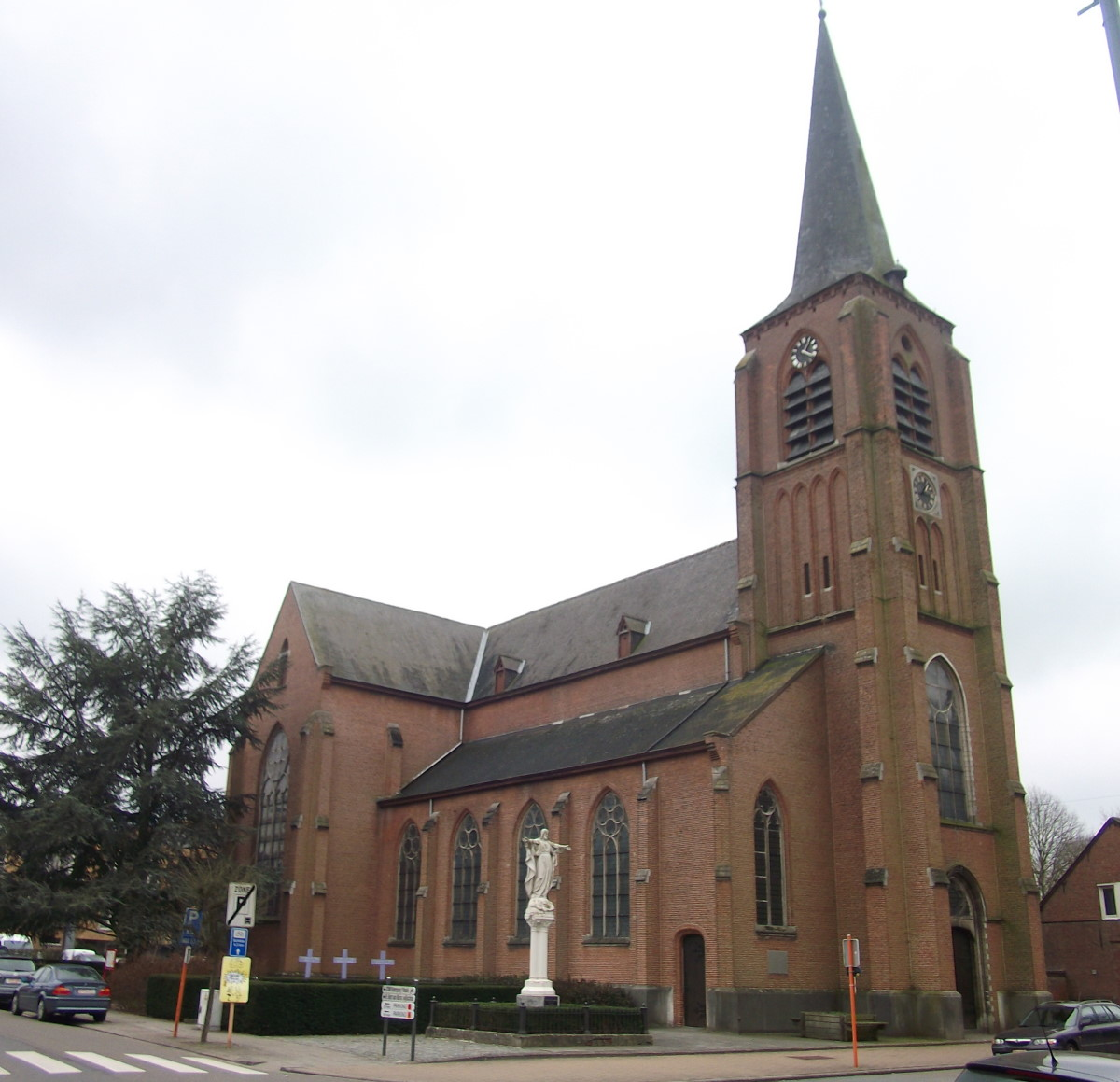 Sint Catharinakerk 's Gravenwezel, Schilde, België